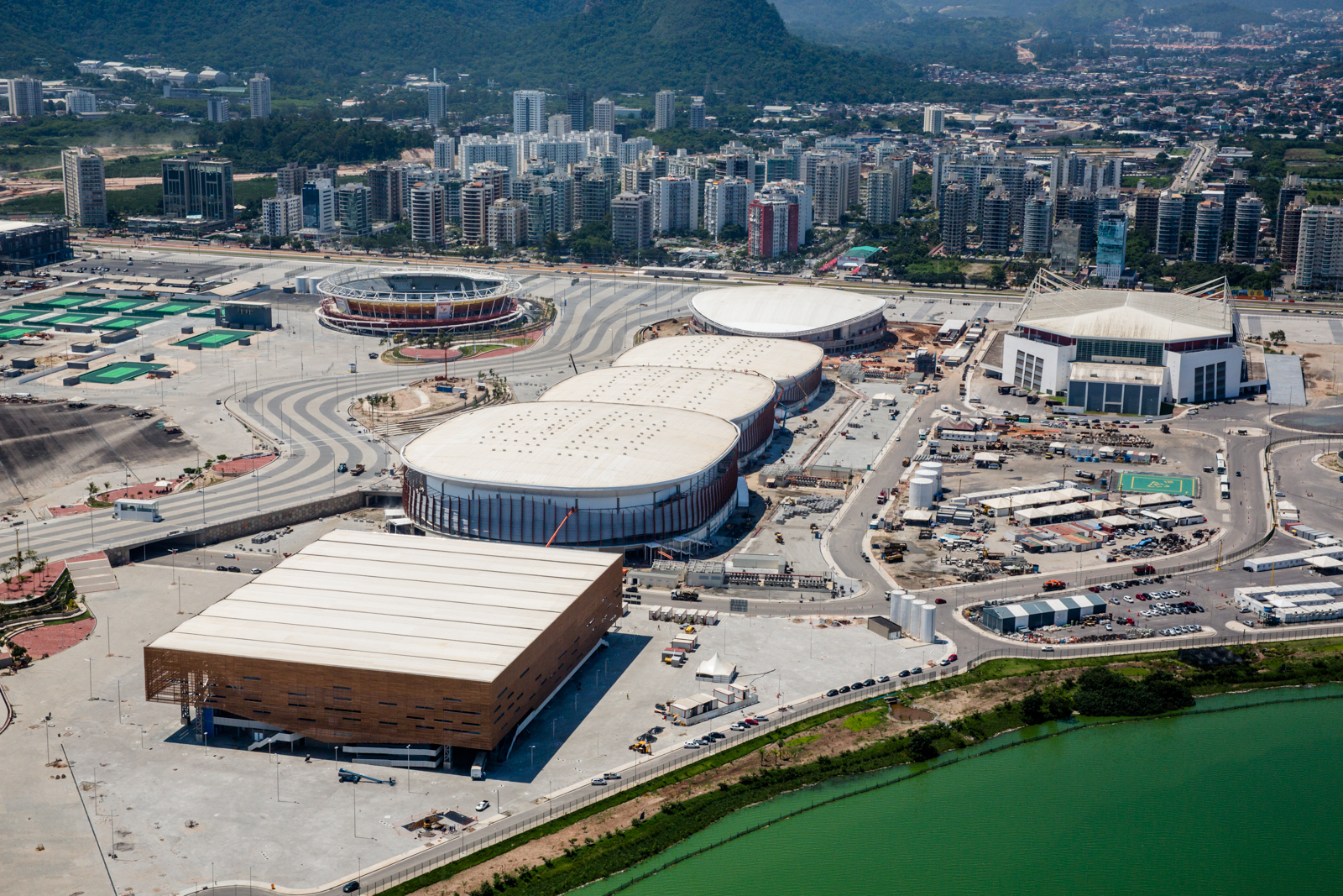 Arena do Futuro (em primeiro plano), Arenas Cariocas 1, 2 e 3 e Velódromo (ao fundo), no Parque Olímpico da Barra